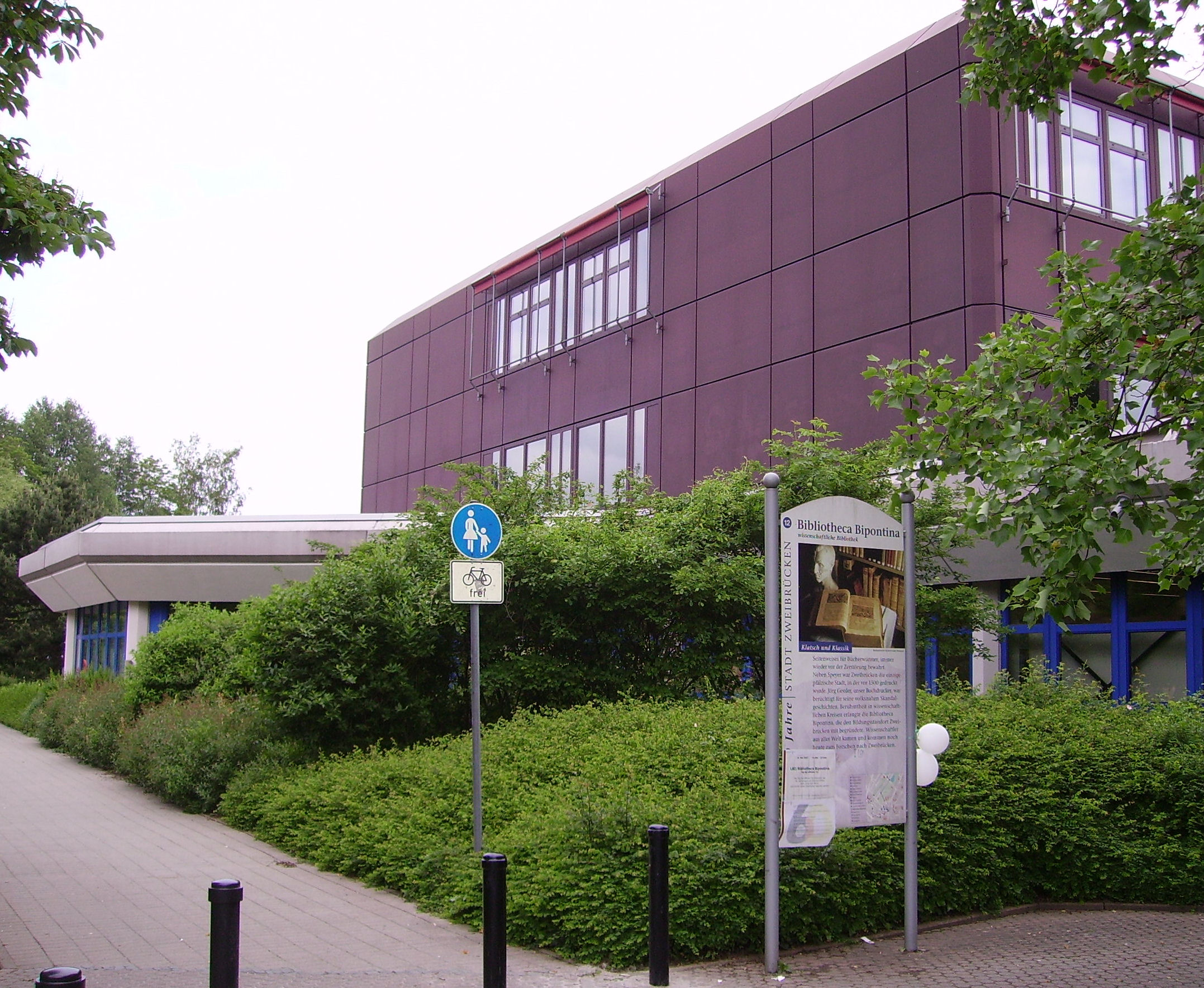 view of Zweibrücken, Germany